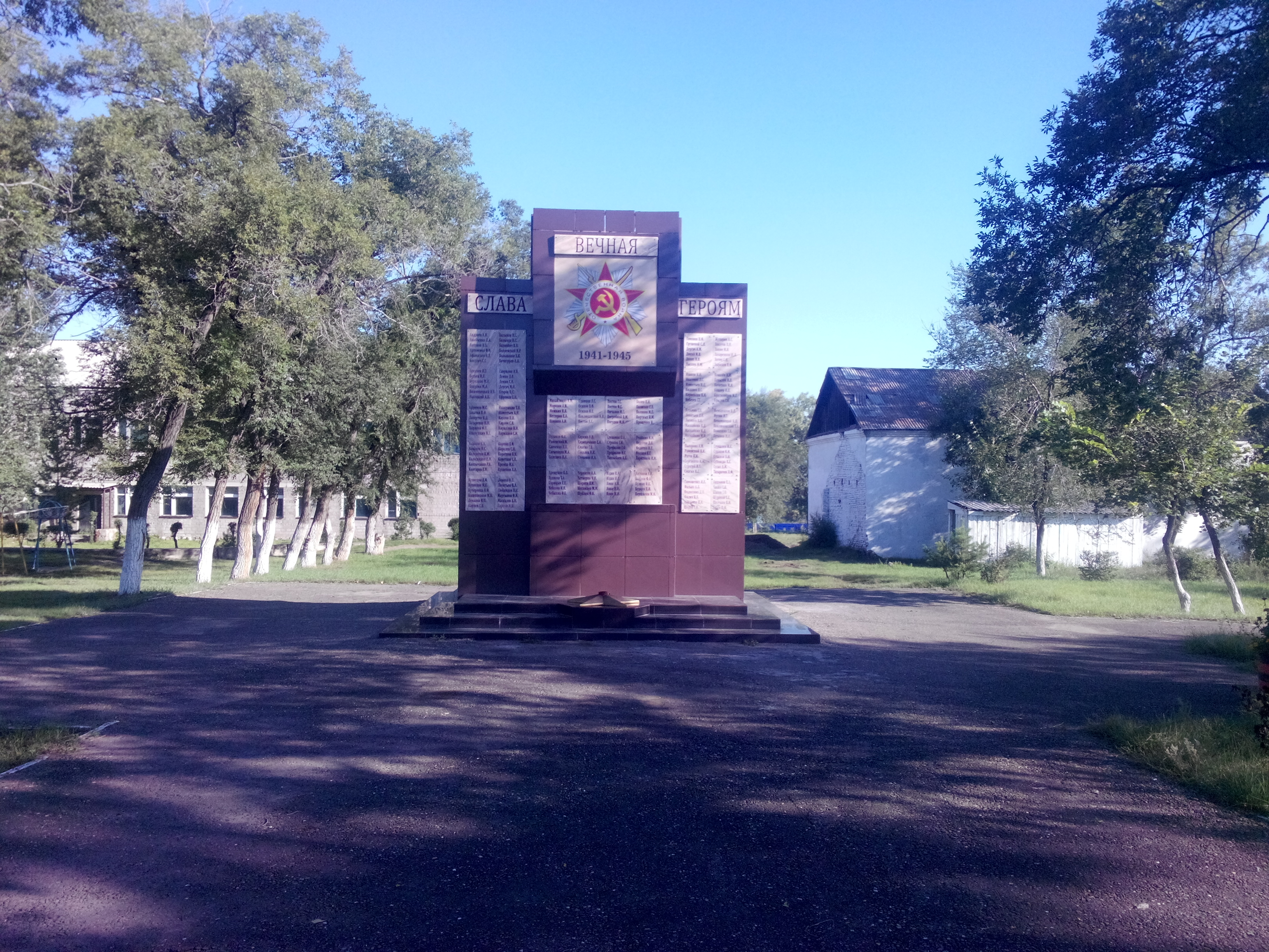 Памятник землякам, павшим в годы Великой Отечественной войны: Изыхские копи, Алтайский район, Хакасия